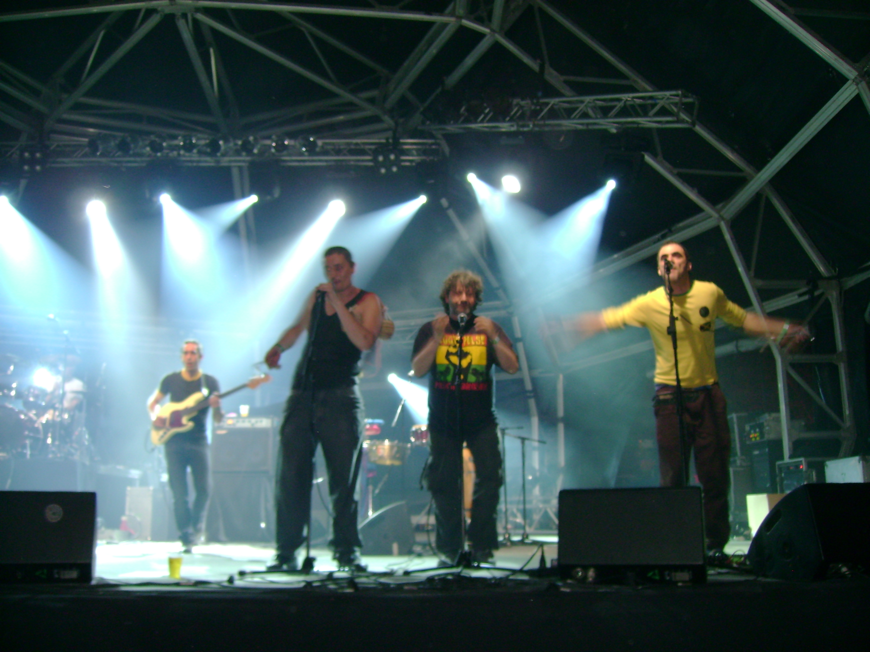 Live Color Humano